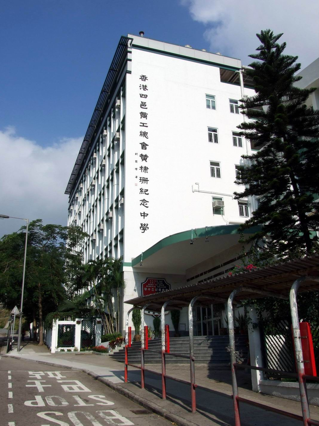 香港四邑商工總會黃棣珊紀念中學